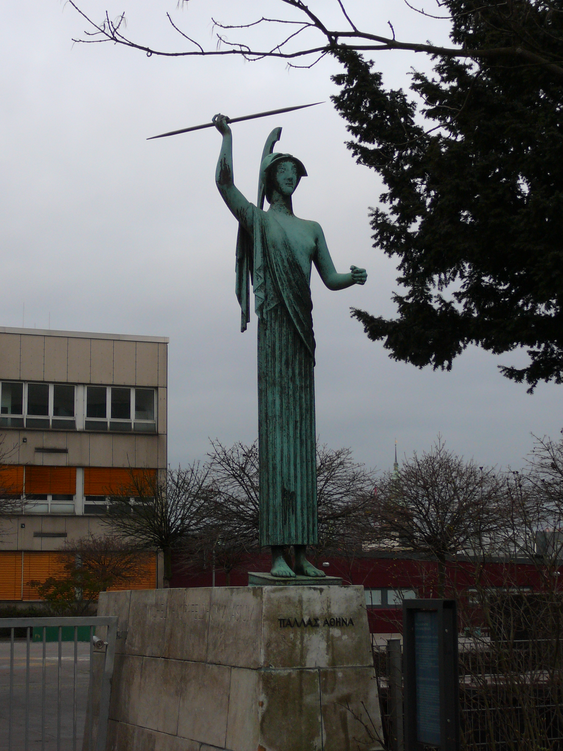 Johannisberg, Wuppertal